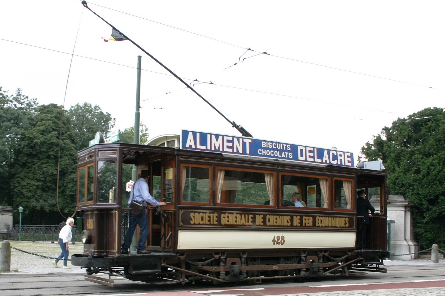 Historeschen Tram zu Bréissel. Kategorie:Bréissel Kategorie:Trammen